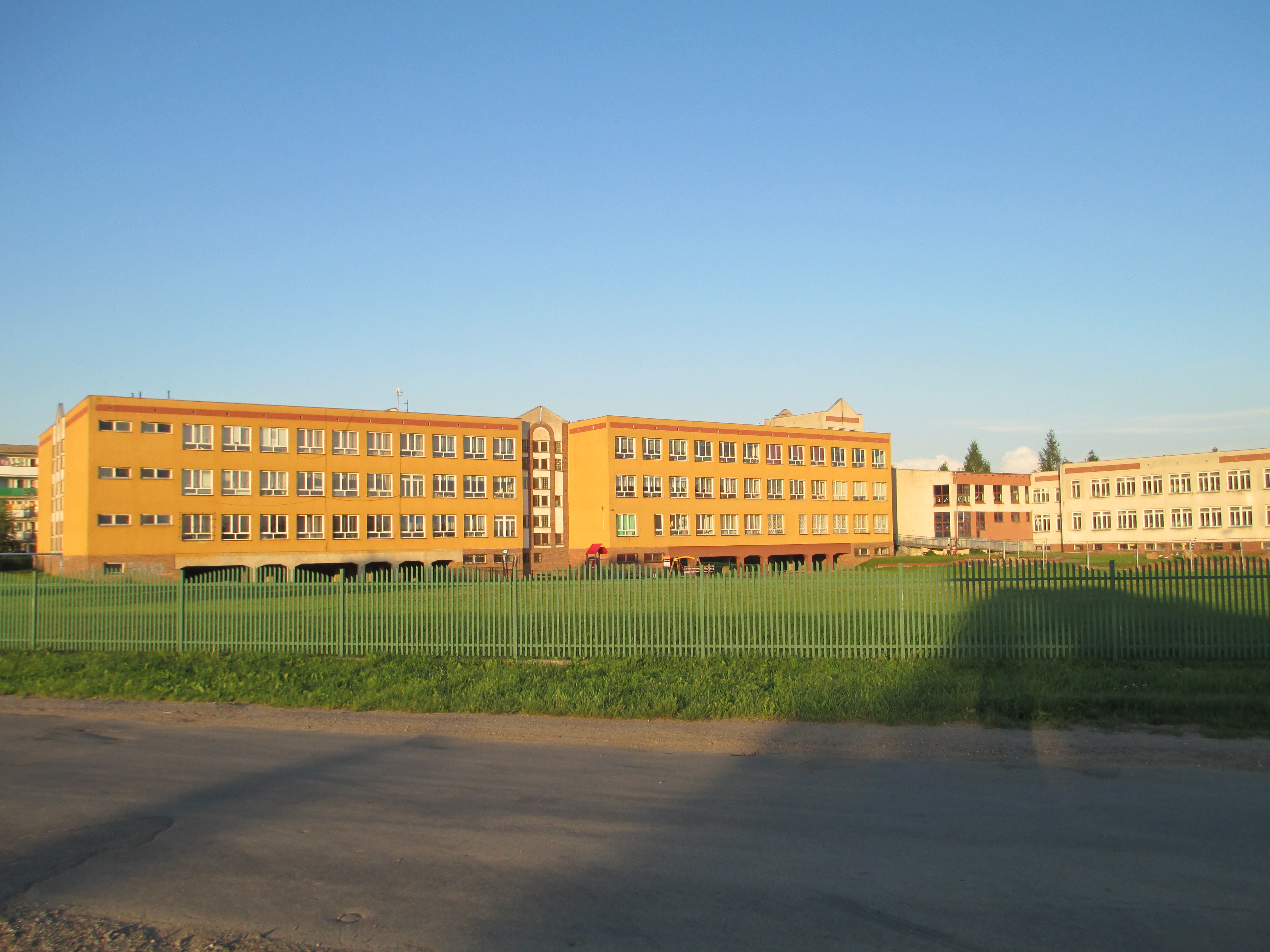 Ełk - Szkoła Podstawowa nr 9